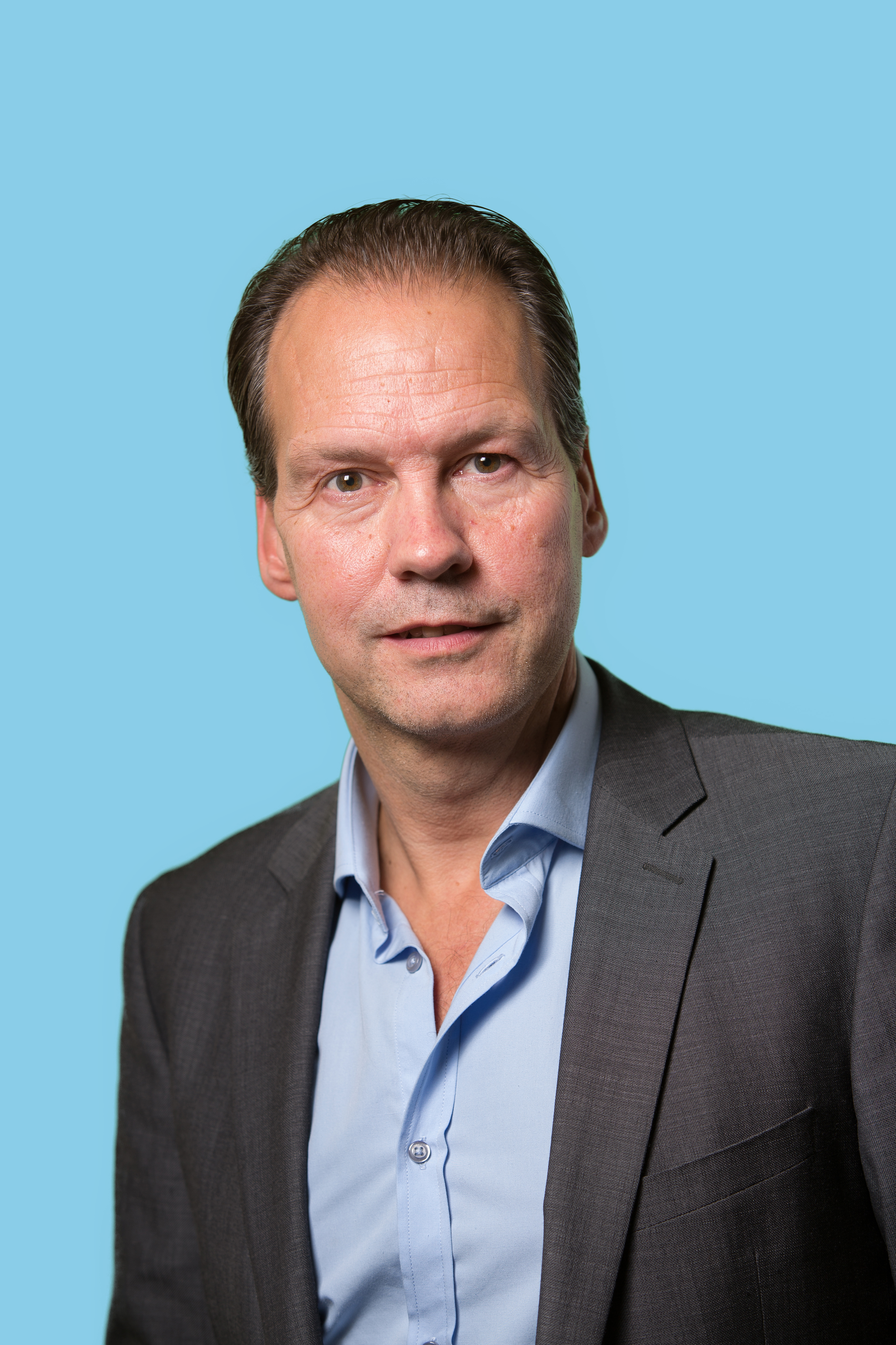 22 november 2016. Tweede Kamerlid voor de Partij van de Arbeid. Foto: Lex Draijer.